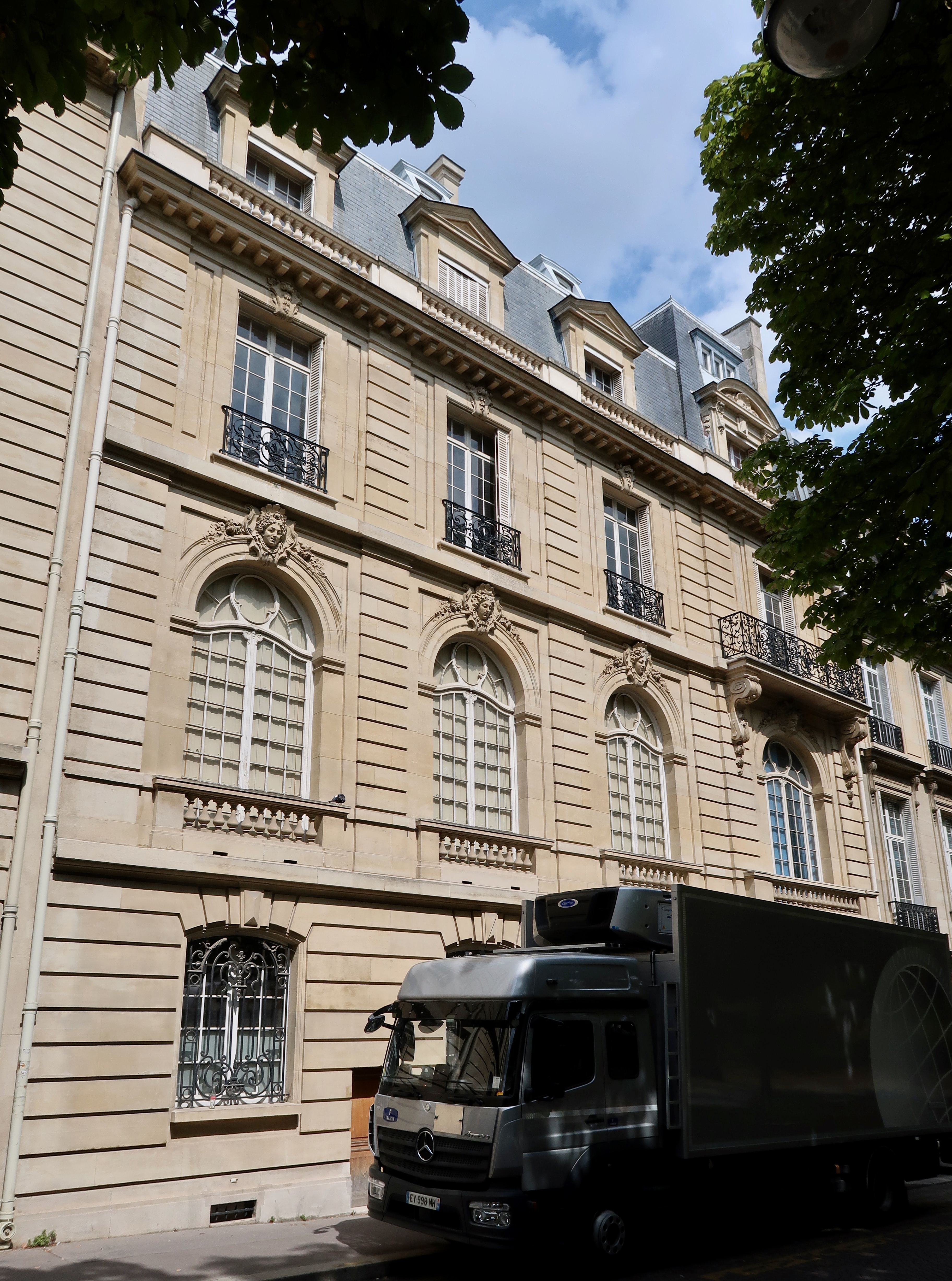 8 place des États-Unis (Paris, 16e).